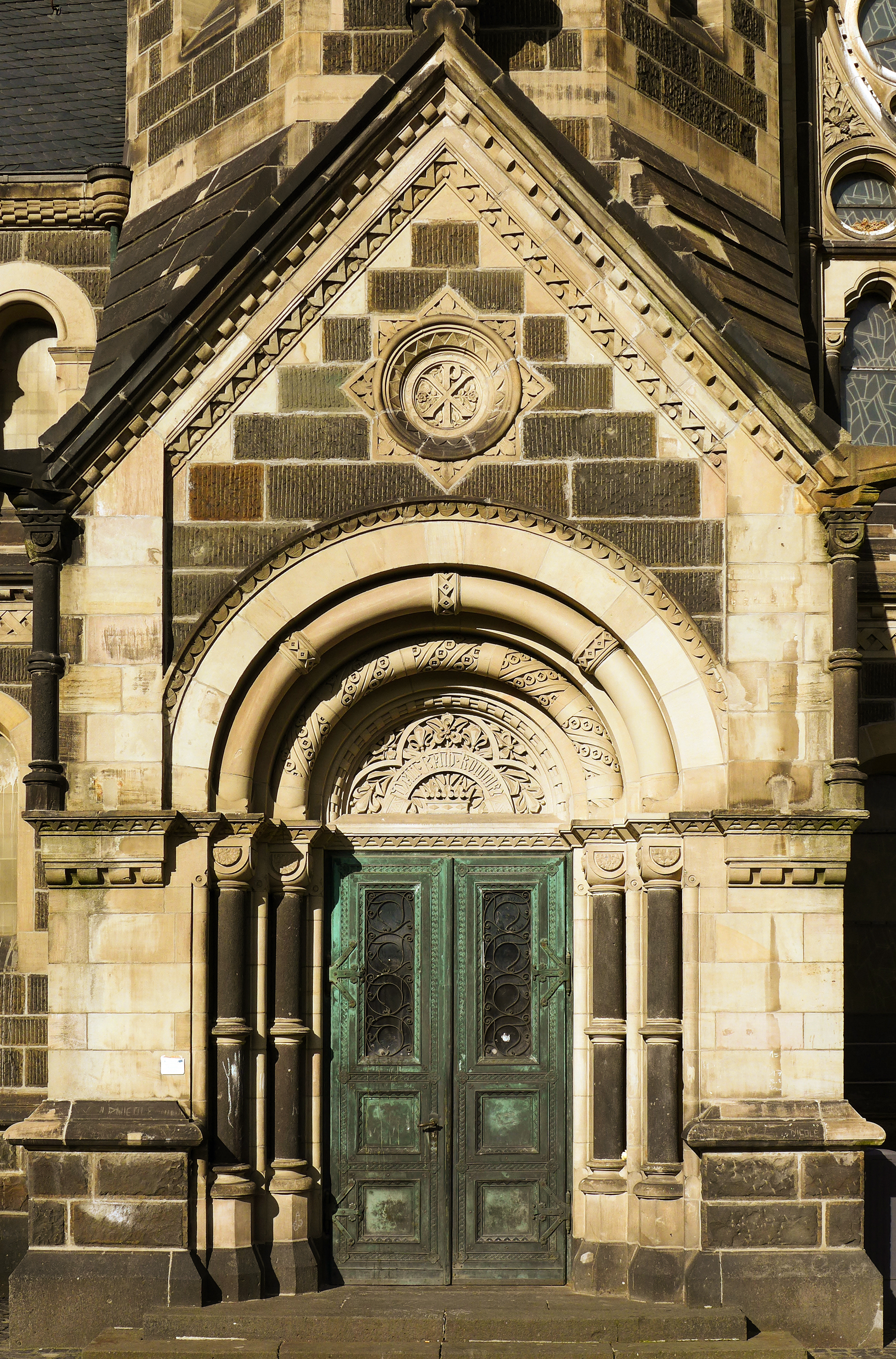 Evangelische Hauptkirche Rheydt - Portal (Südwest)